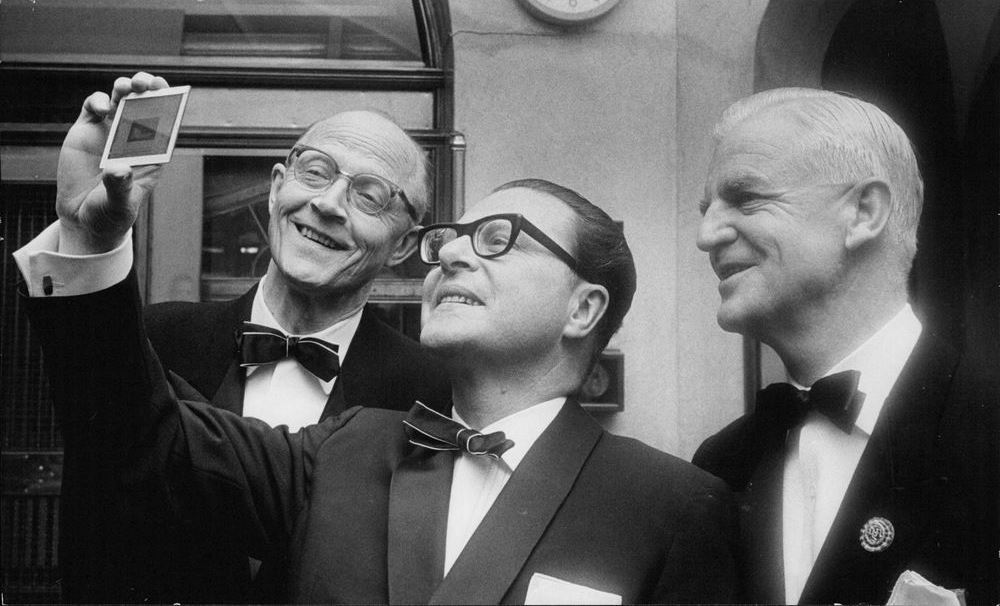 Det norske samfund i Stockholm - 70 årsjubileum 16 mars 1965, från vänster Tore Moxness (1903-1976), Charles Koklin (1913-1994) och Gunnar Qvenild (1906-2007).